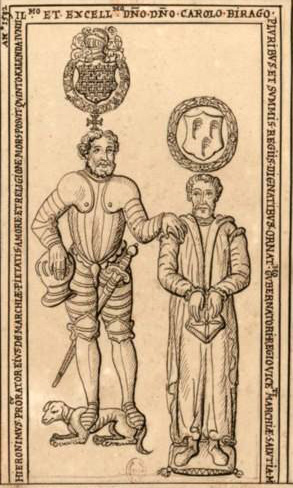 relevés fait pour le collectionneur Roger de Gaignières.